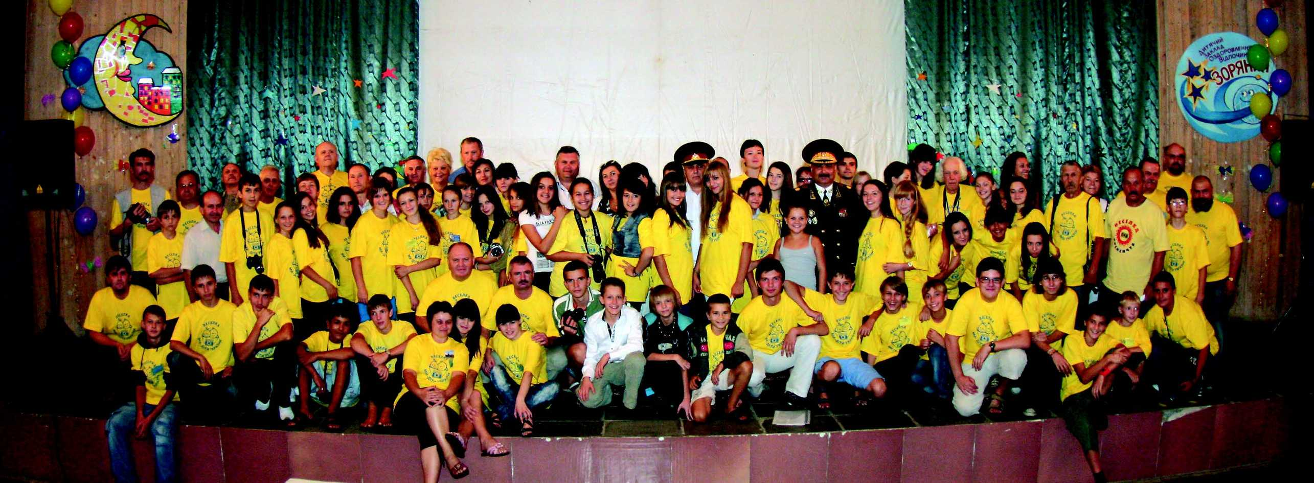 Фотографія з фестивалю "Веселка"